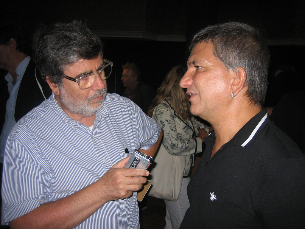 Antonello Falomi intervista Nichi Vendola per il sito di Sinistra e Libertà